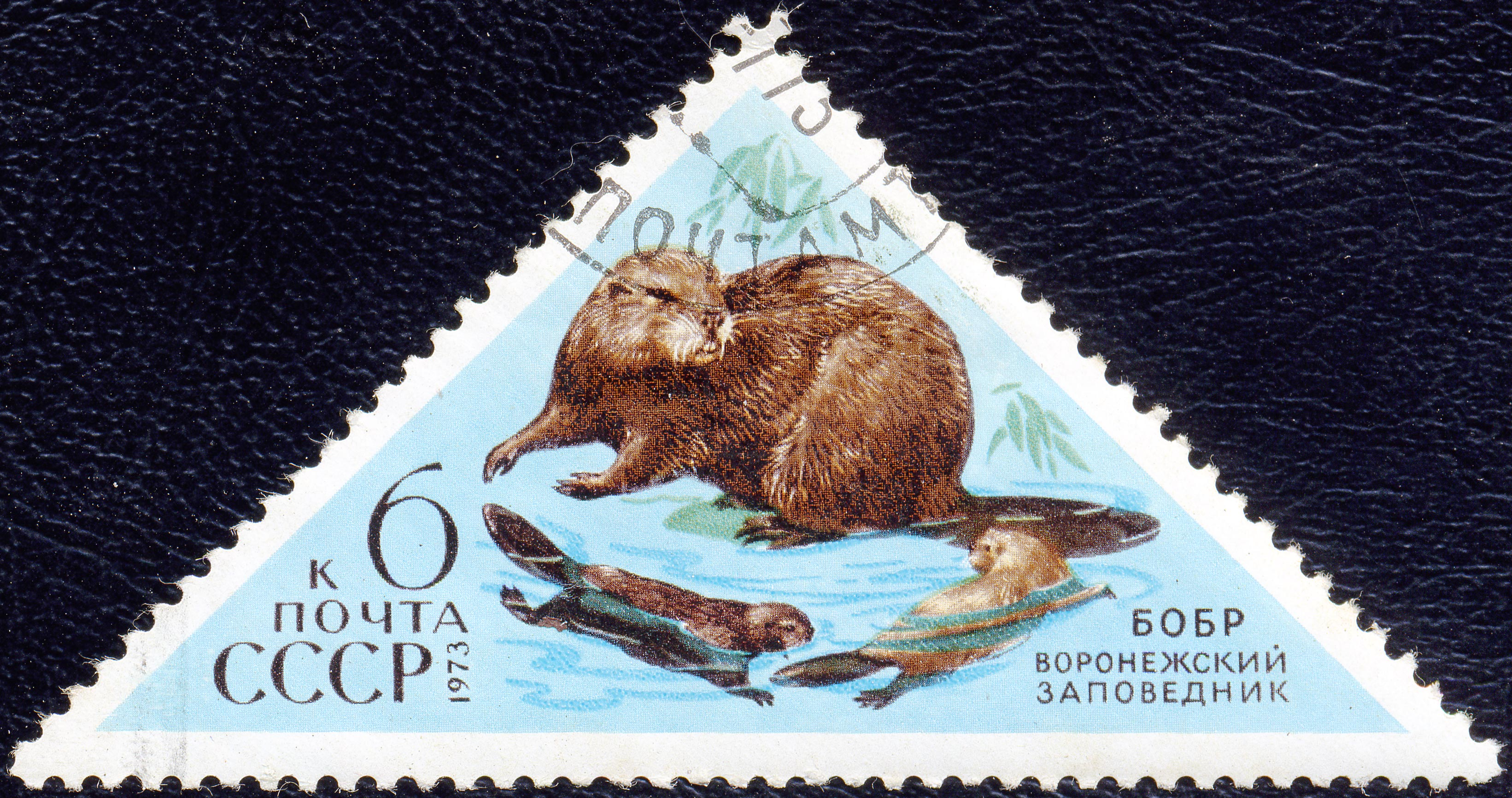 Почтовая марка СССР. 1973. Воронежский заповедник. Бобр